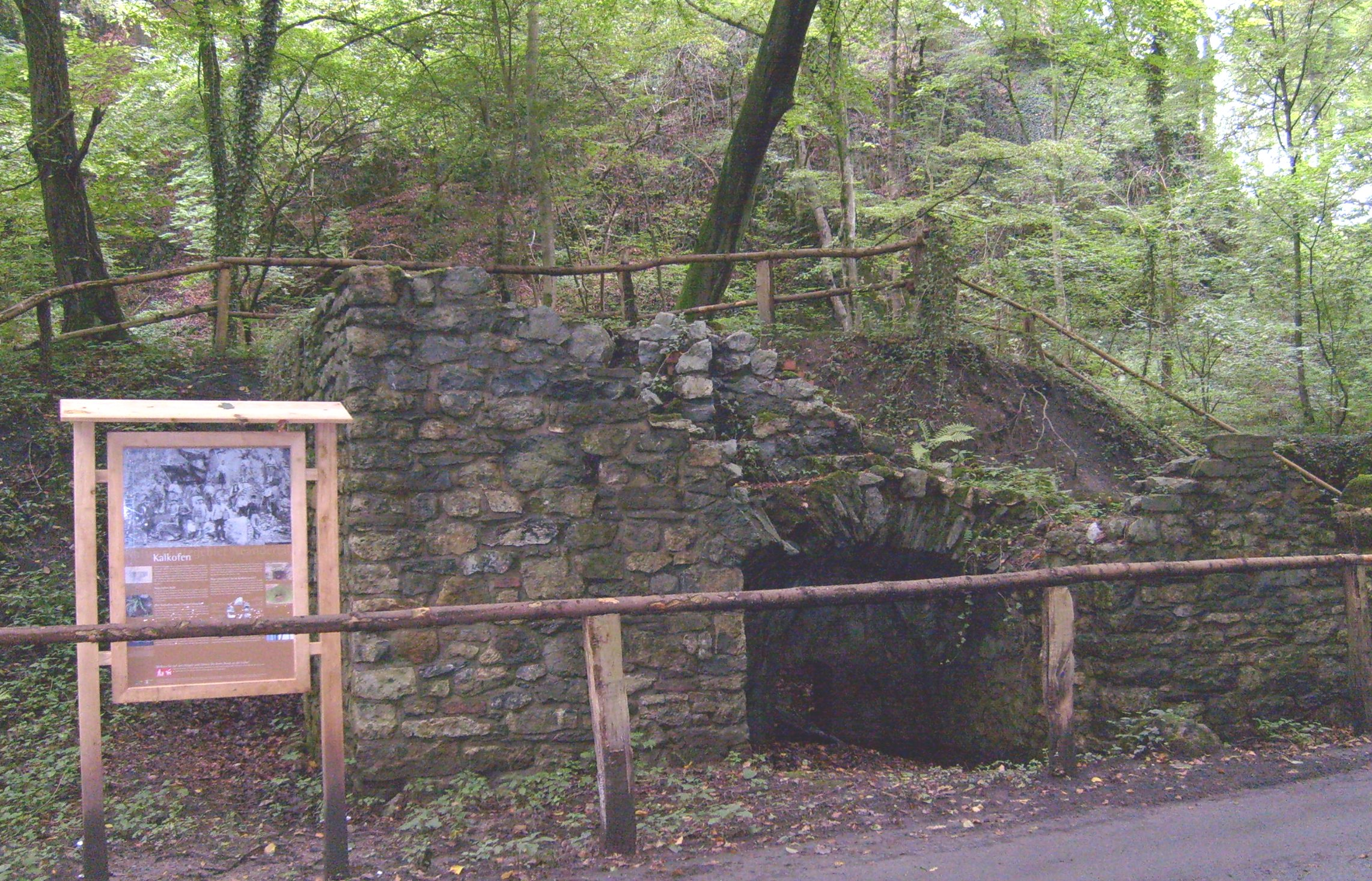 Kalkofen Huppertsbracken zwischen den Höfen Thunis und Bracken an der Düssel gelegen am Städtedreieck Erkrath, Haan, Mettmann - erste Erwähnung 1672, restauriert 1986